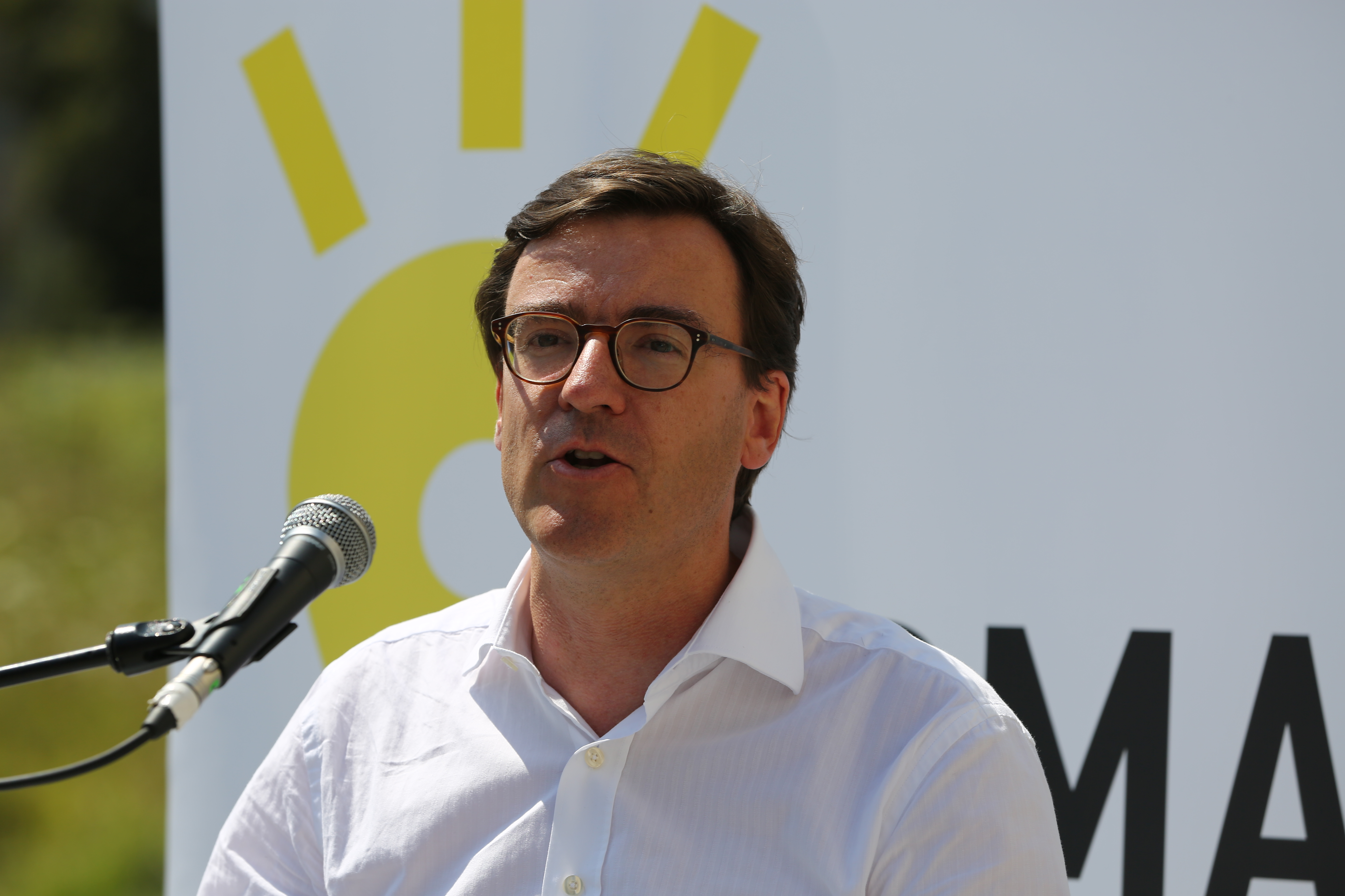 Christian Amlong, München, Geschäftsführer der Städtischen Wohnbaugesellschaft GWG, vorher Stadtrat (SPD)